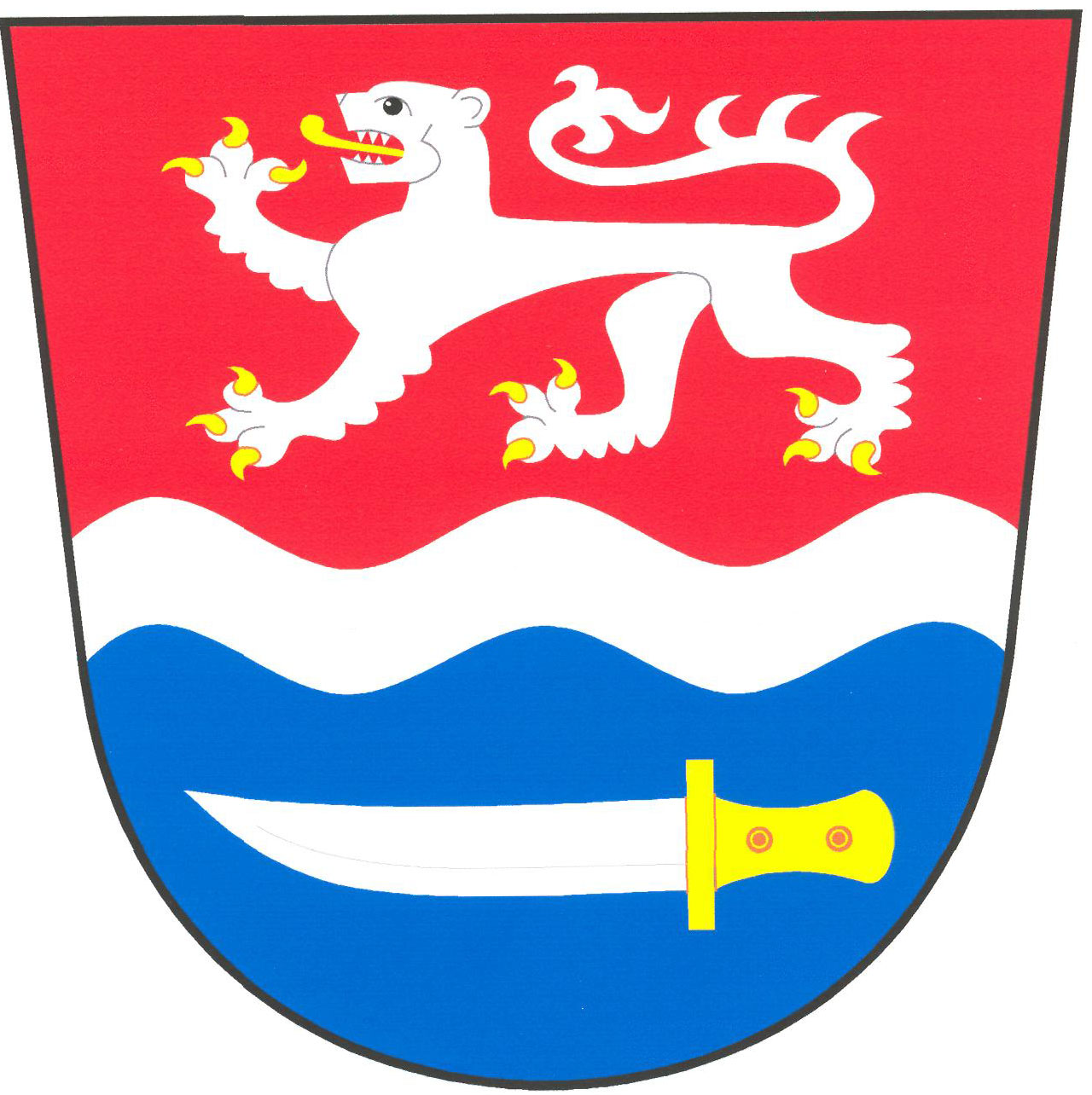 Znak obce Hrdlořezy (okres Mladá Boleslav)